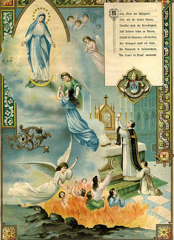 Chromolithographie um 1900, ca. 20 x 30 cm, mit rückseitiger Bestätigung der Mitgliedschaft in einem Messbund.